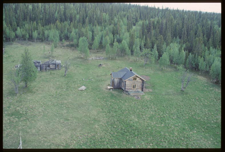 Motiv: Delliknäs Nyckelord: Flygbilder Kategori: Fjällmiljö Delliknäs.